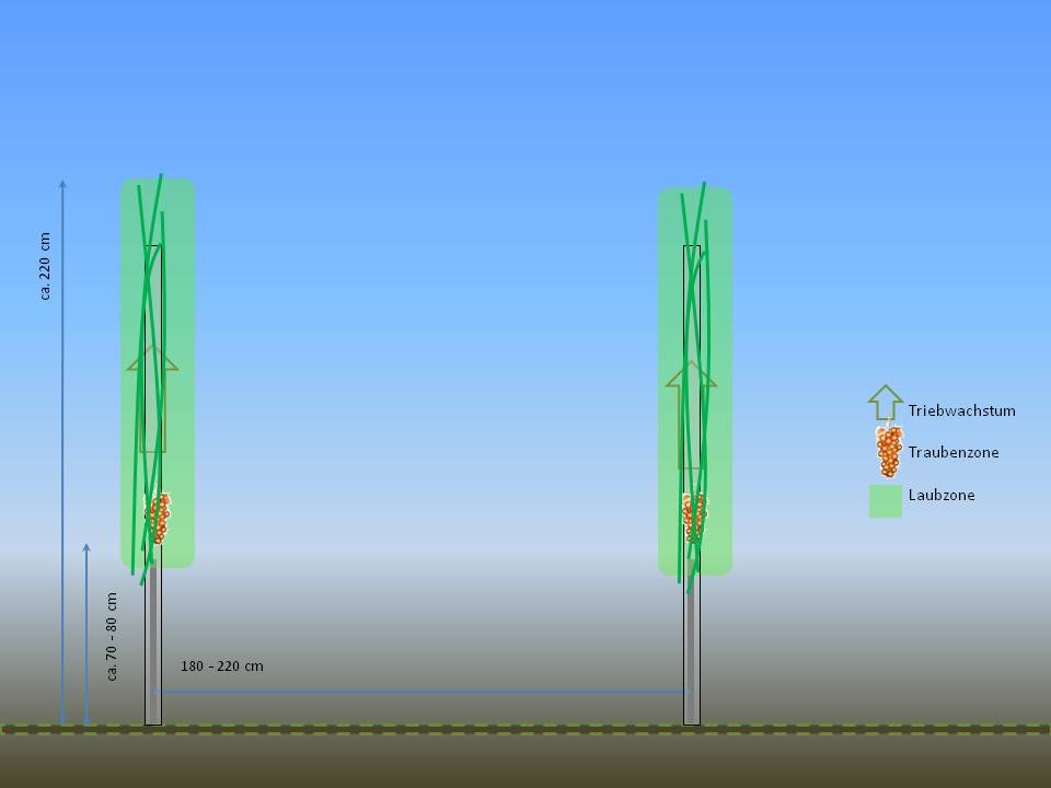 Spaliererziehung